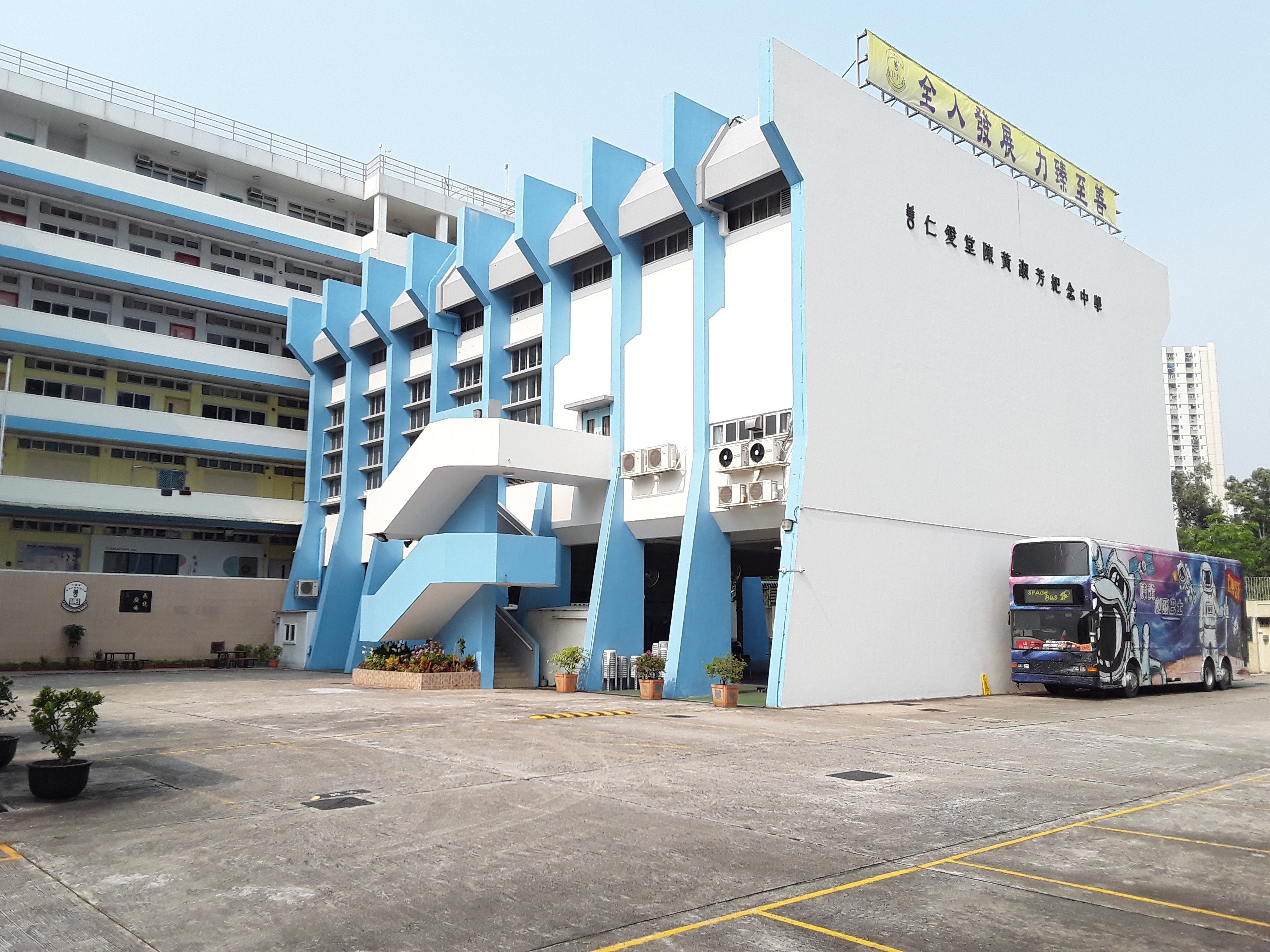 仁愛堂陳黃淑芳紀念中學校舍內貌與創藝巴士